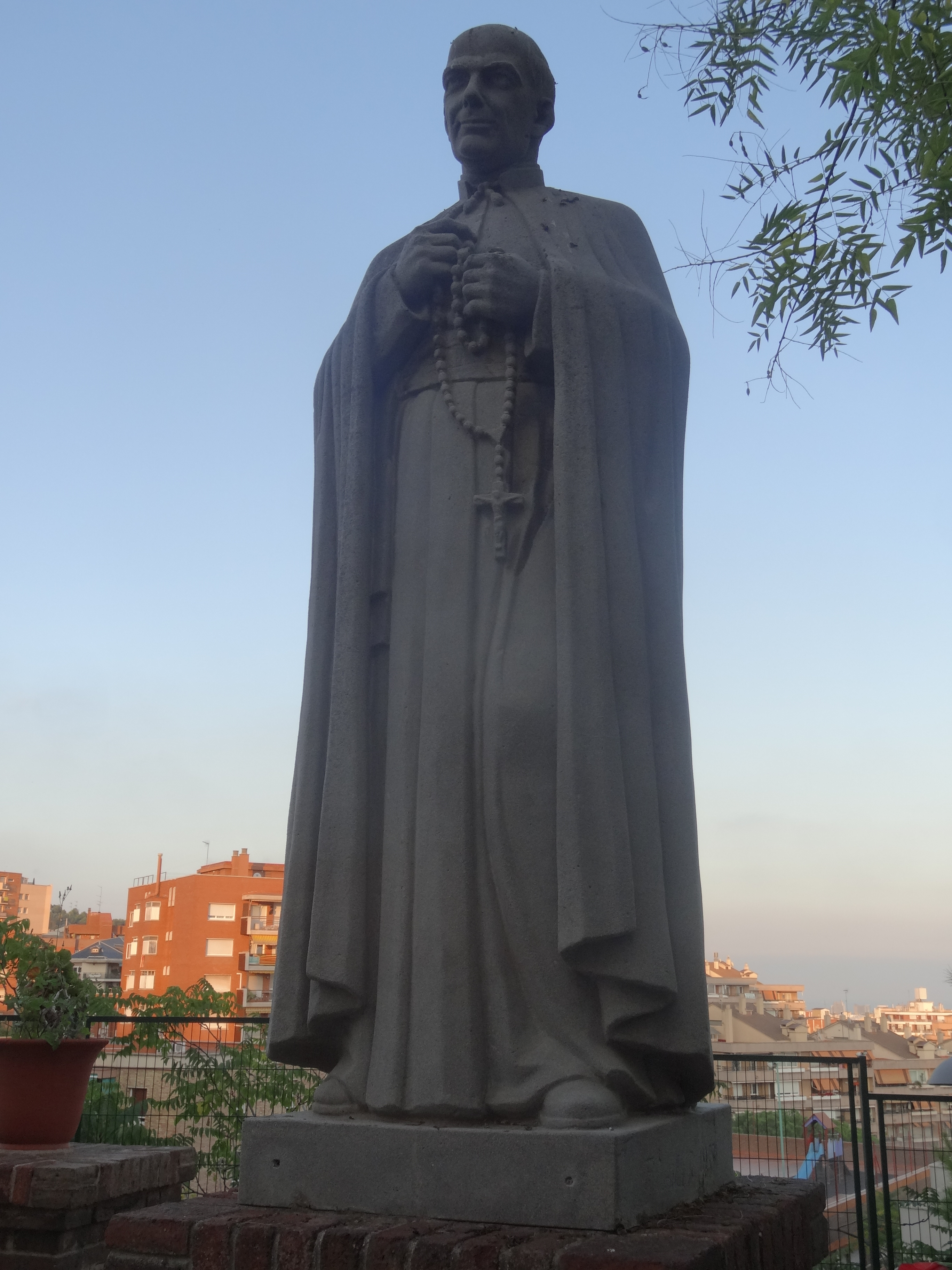 Estatua a l'entrada del Cottolengo del Pare Alegre